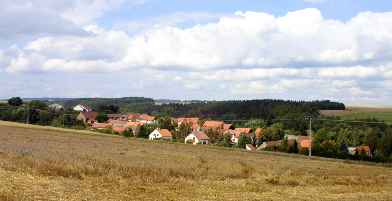 Ves Buček (součást města Kožlany, okres Plzeň-sever) od silnice k Lednici.